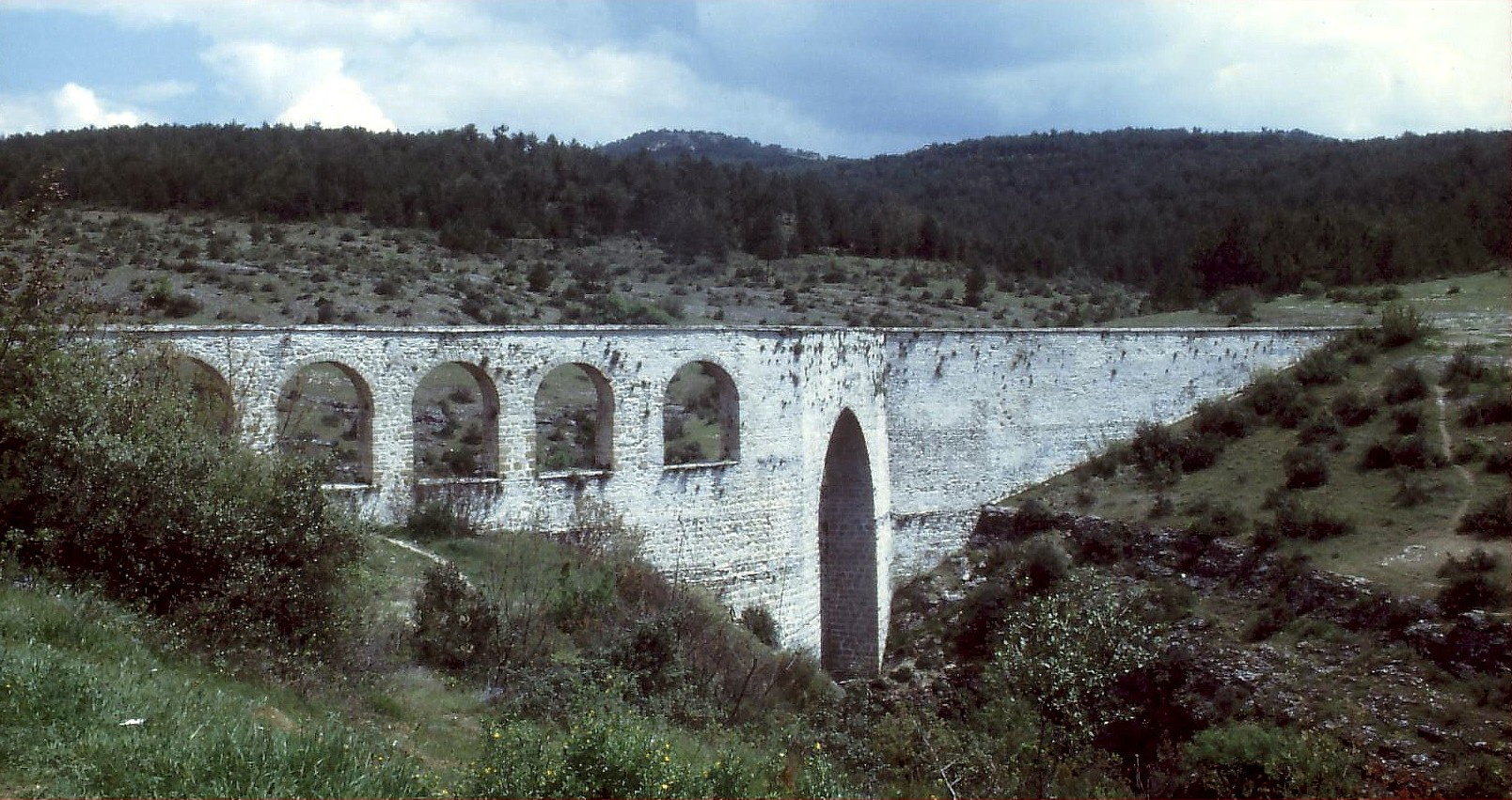 Aquädukt in der Umgebung von Safranbolou